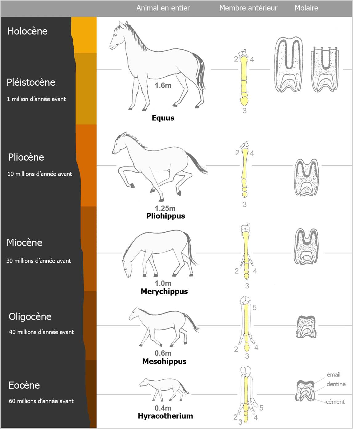 évolution du cheval - traduction et adaptation du schéma Horseevolution.png